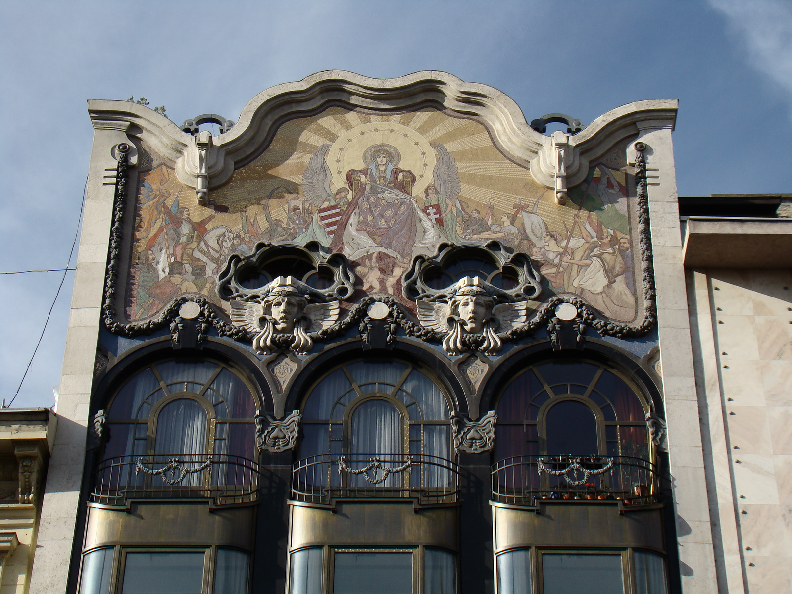 Ház (Budapest 5, Szervita tér 3.) This is a photo of a monument in Hungary, Identifier: 621